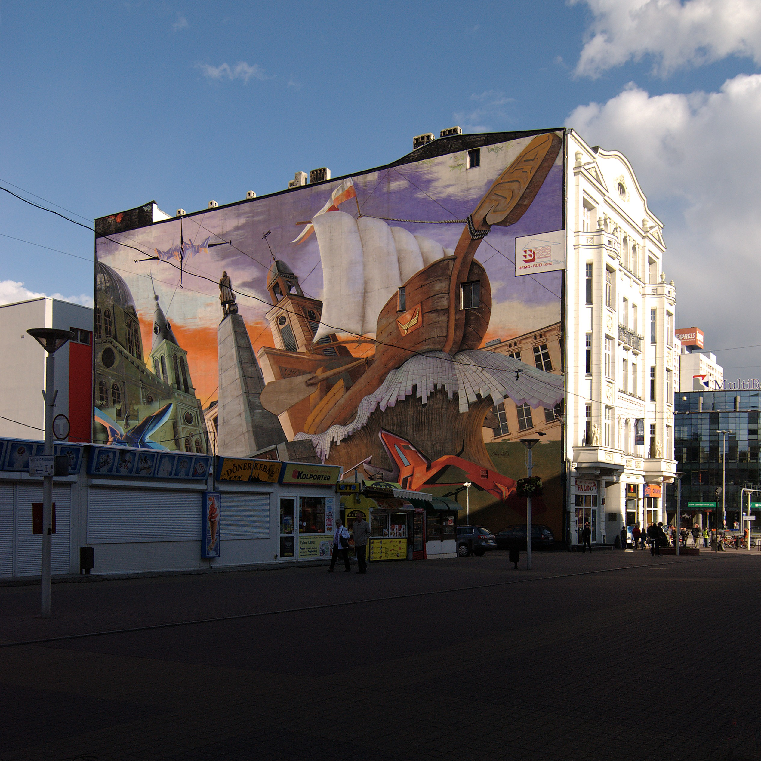 Łódź. Piotrkowska 152.